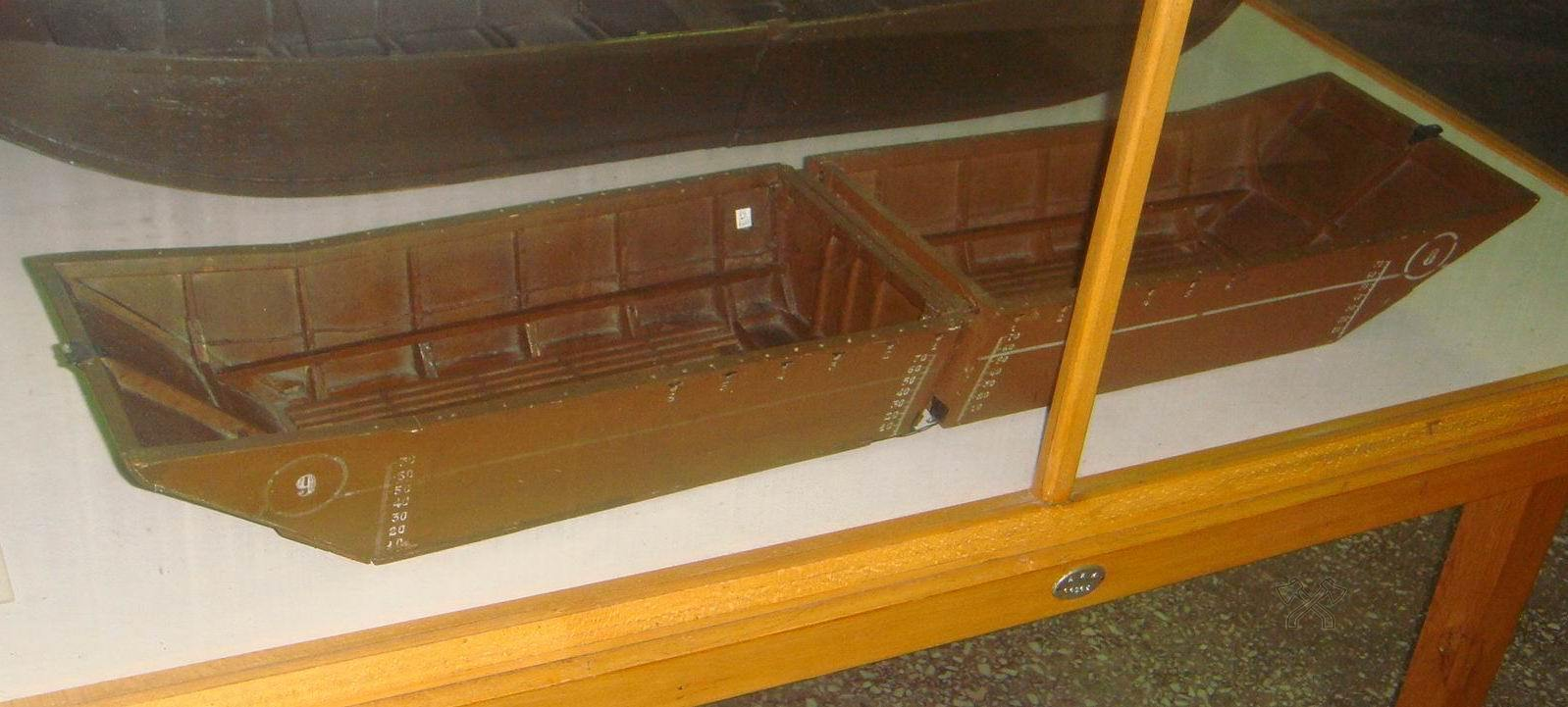 ДЛП